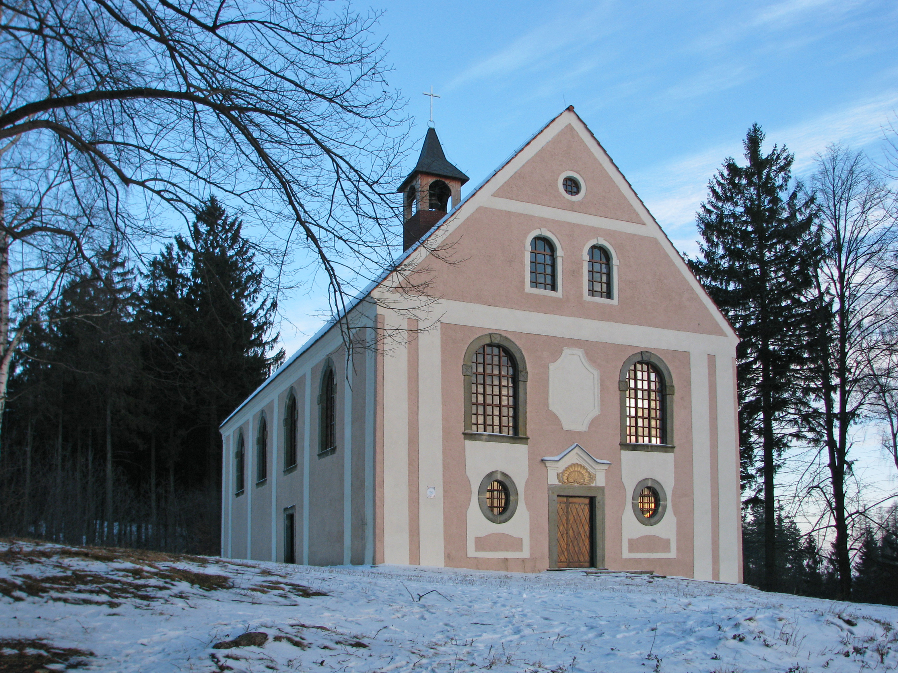 Kaplica św. Anny na Górze Świętej Anny obok Krzeszowa.